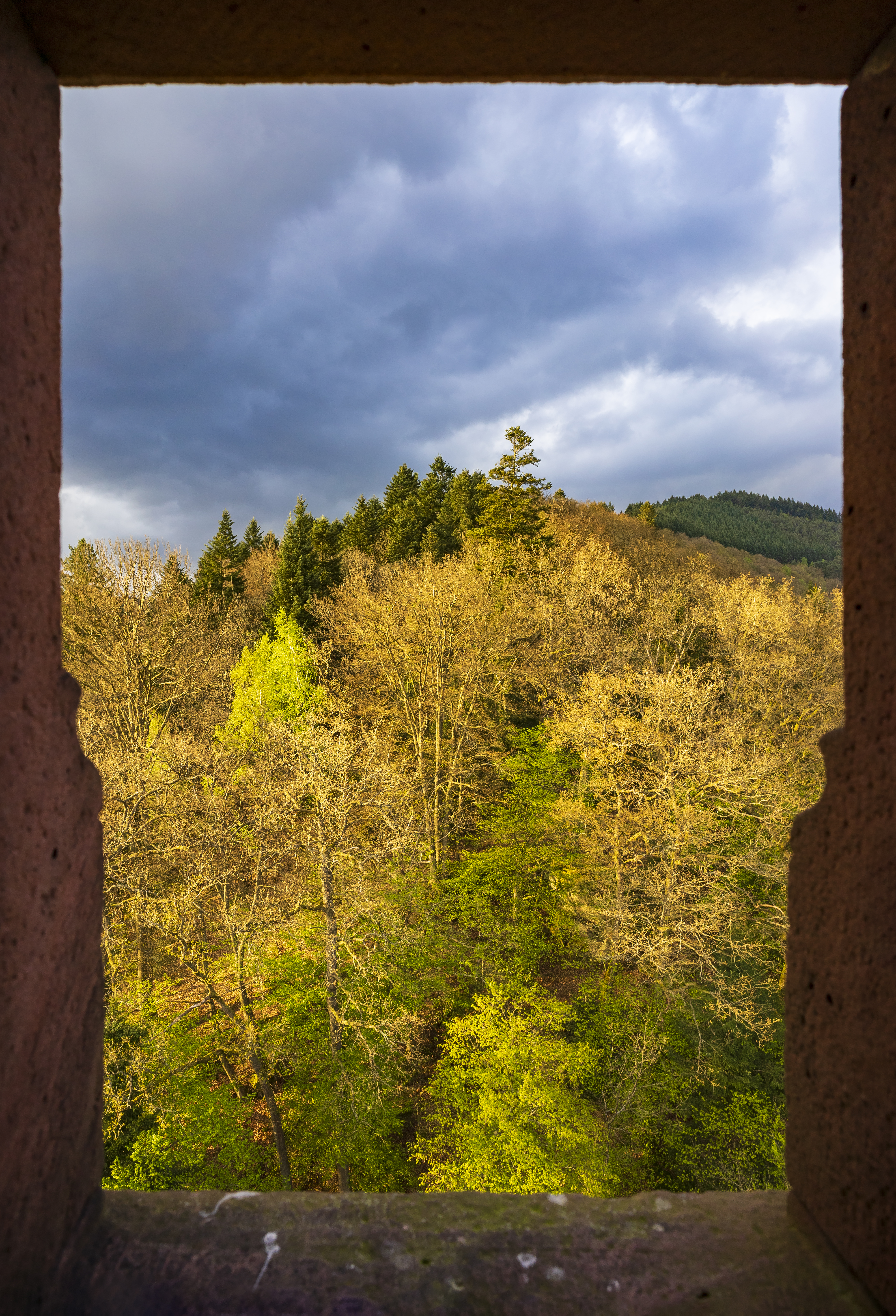 Blick aus einem historischen Sandstein-Fenster des Bergfrieds von Burg Hirschhorn nach Nordosten auf den von Gewitterlicht dramatisch beleuchteten Berghang mit artenreichem Wald. Dieser Hang gehört bereits zum Flora-Fauna-Habitat-Gebiet „Odenwald bei Hirschhorn“ (Nr. 6519-304, Beschreibung1, Beschreibung 2, protected planet-Nr. 555521577).